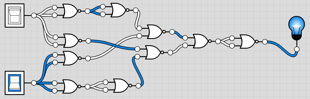 cicuito simmples feito só com nor.jpg